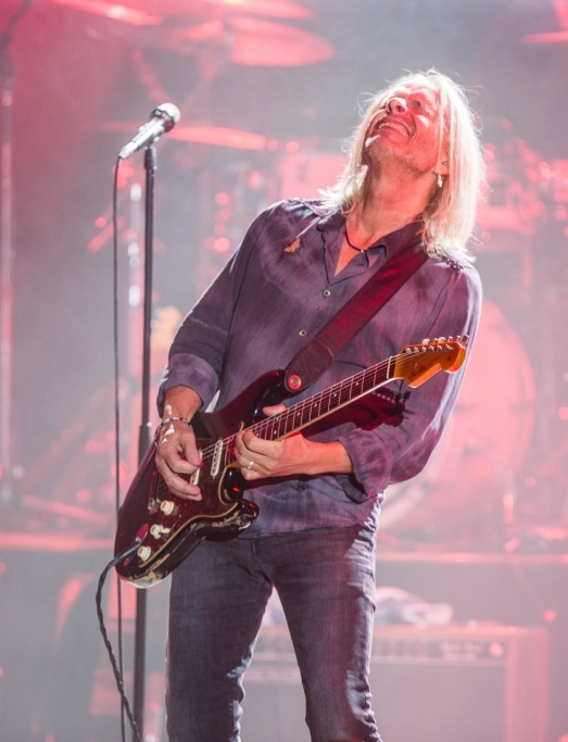 Dan Lucas bei Helter Skelter